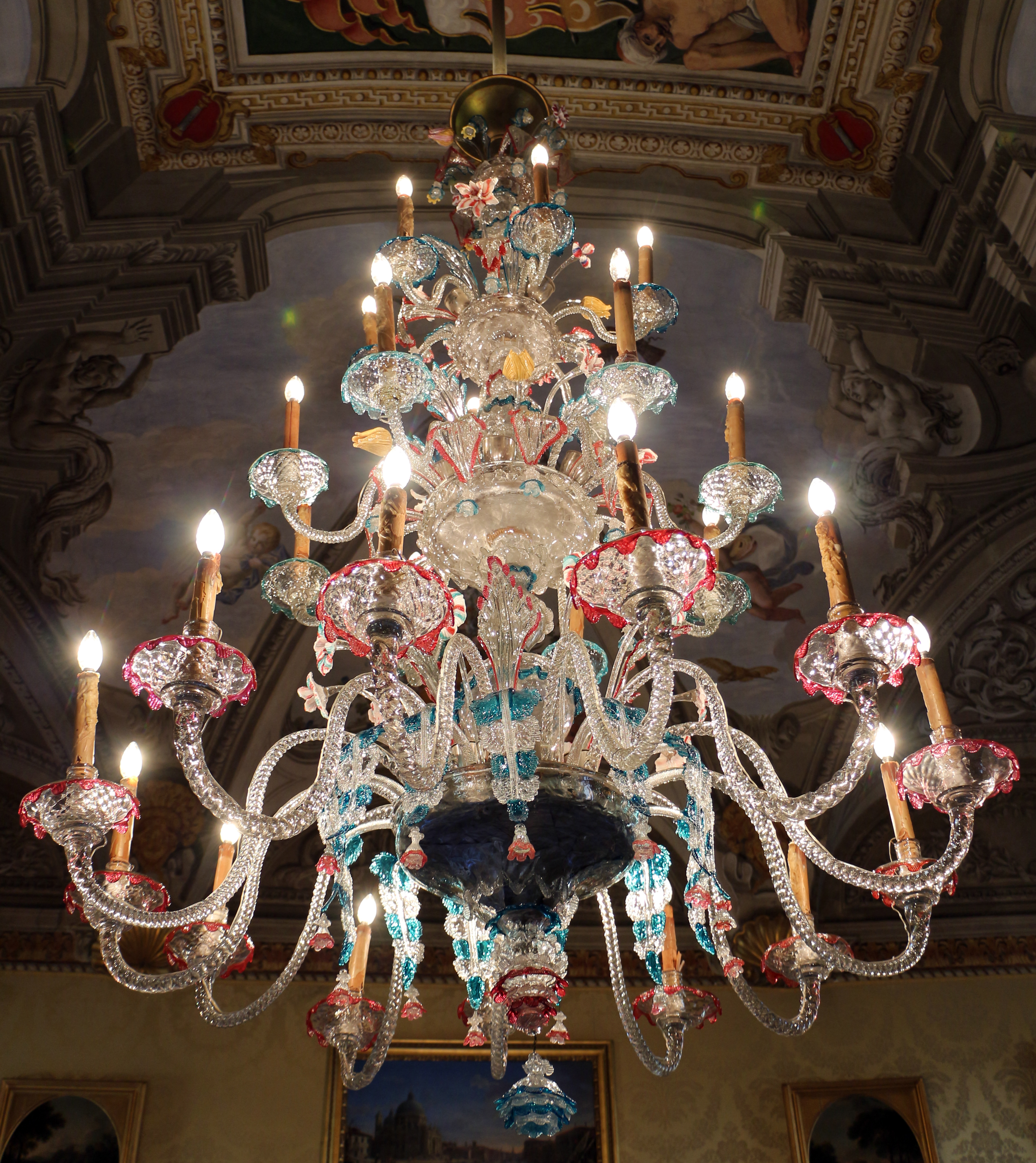 Palazzo colonna, appartamenti di donna isabella, lampadario di murano 01.JPG